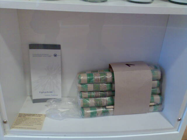 Sprengpatrone des Sicherheitssprengstoffes "Roburit B", der WASAG AG, Sythen